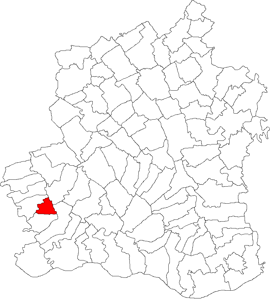 Categorie:Hărţi ale judeţului Teleorman